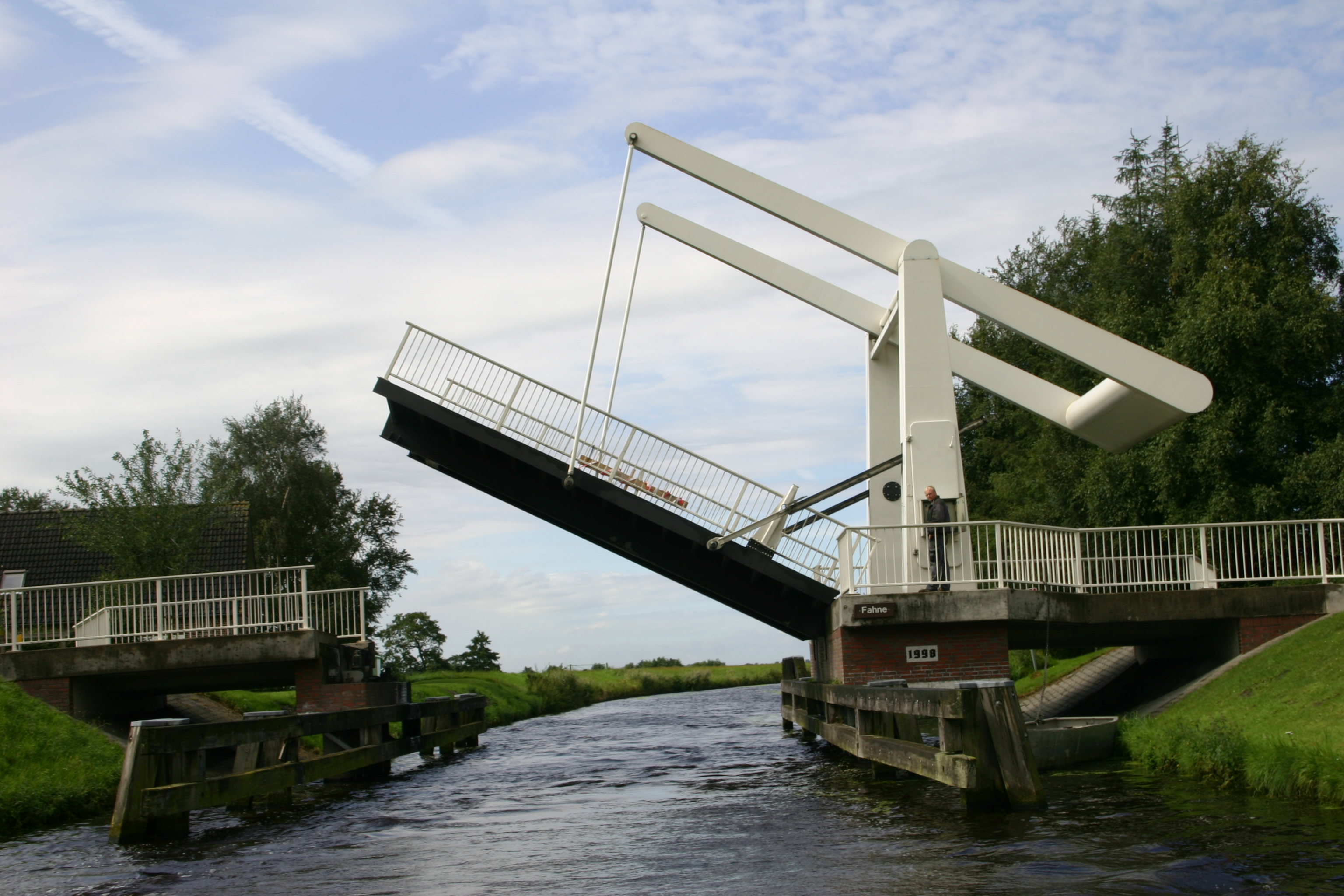 Klappbrücke über den Ems-Jade-Kanal nahe Fahne (Gemeinde Ihlow, Landkreis Aurich, Ostfriesland)